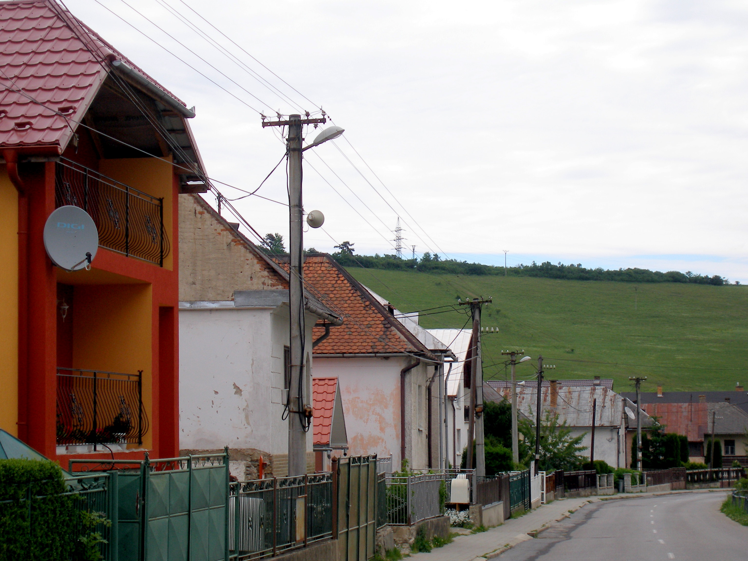 Obec Šarišské Dravce okres Sabinov